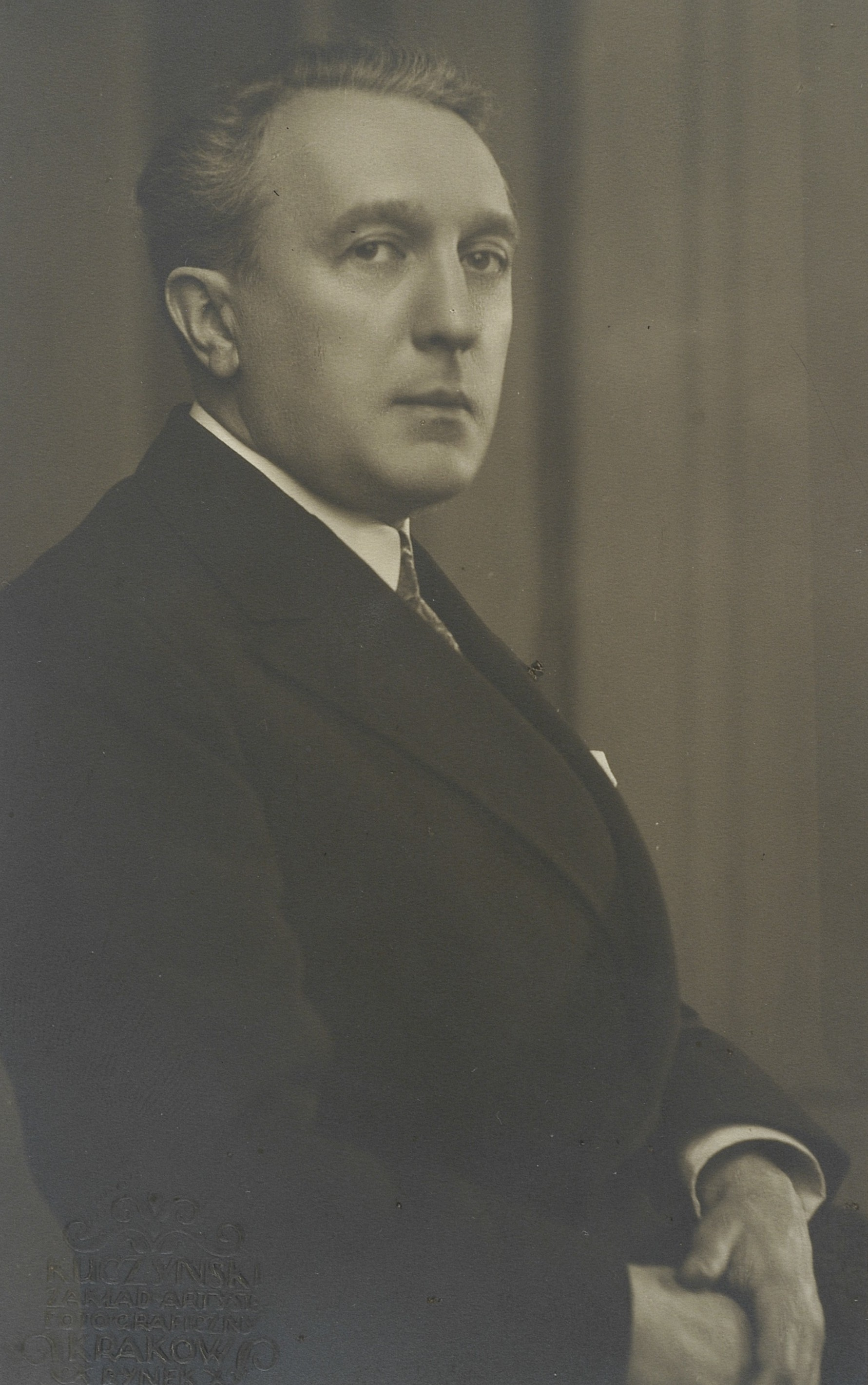 Zdzisław Jachimecki, 1916-1919 r.